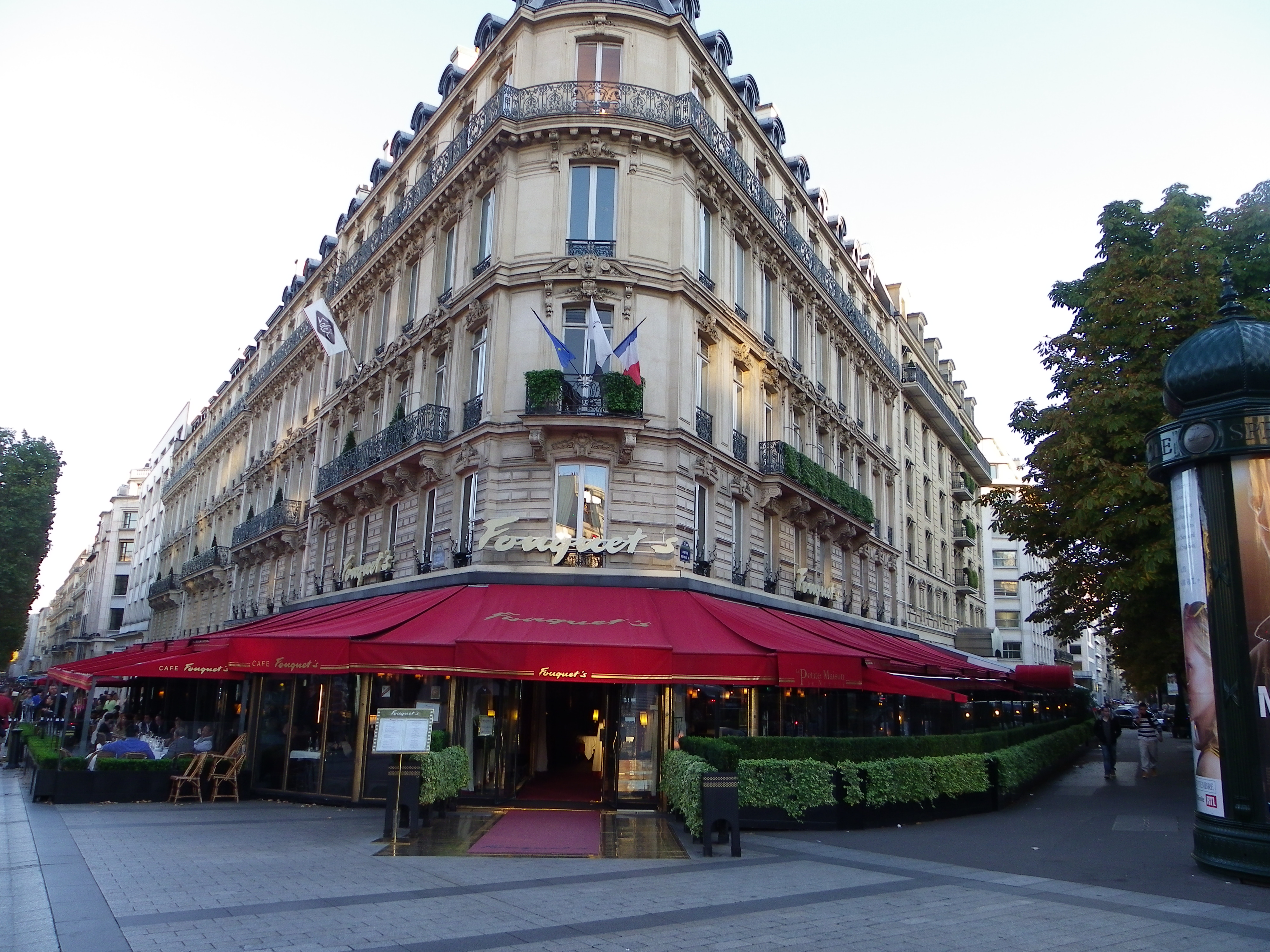 Restaurant Le Fouquet's au 99 avenue des Champs-Elysées à Paris (Inscrit) .